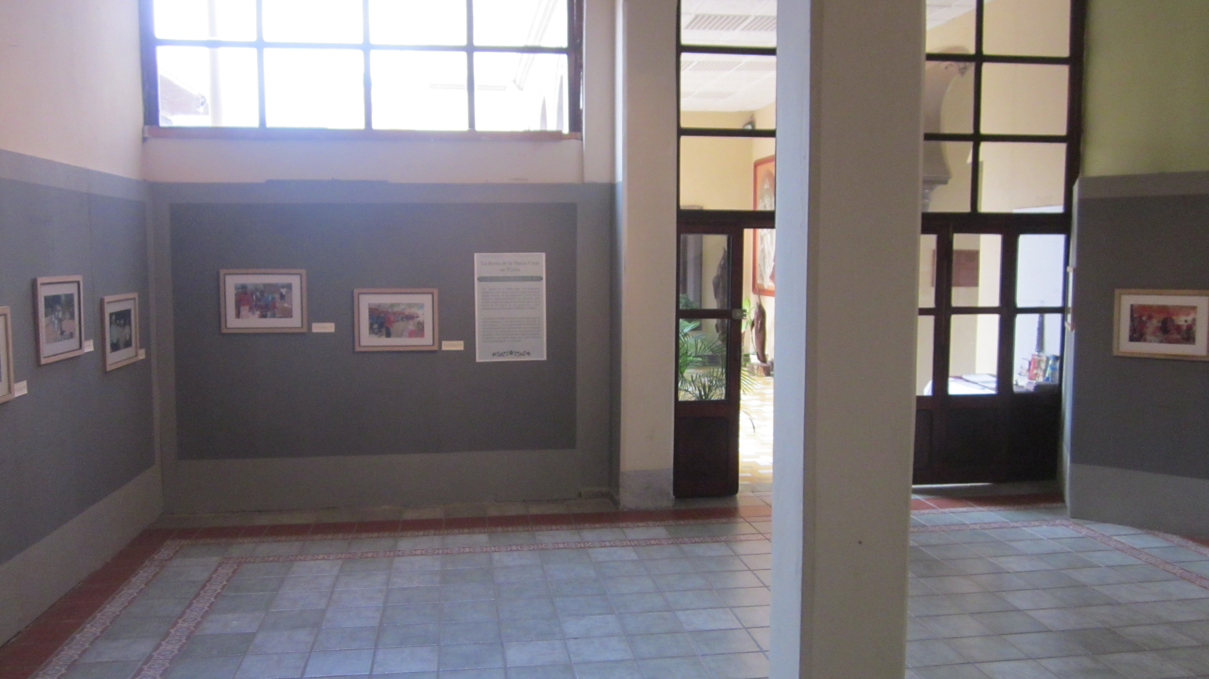 Exposición fotográfica en Sala de exposiciones temporales, Museo de Culturas Populares e Indígenas de Sonora, Hermosillo, Sonora, México.